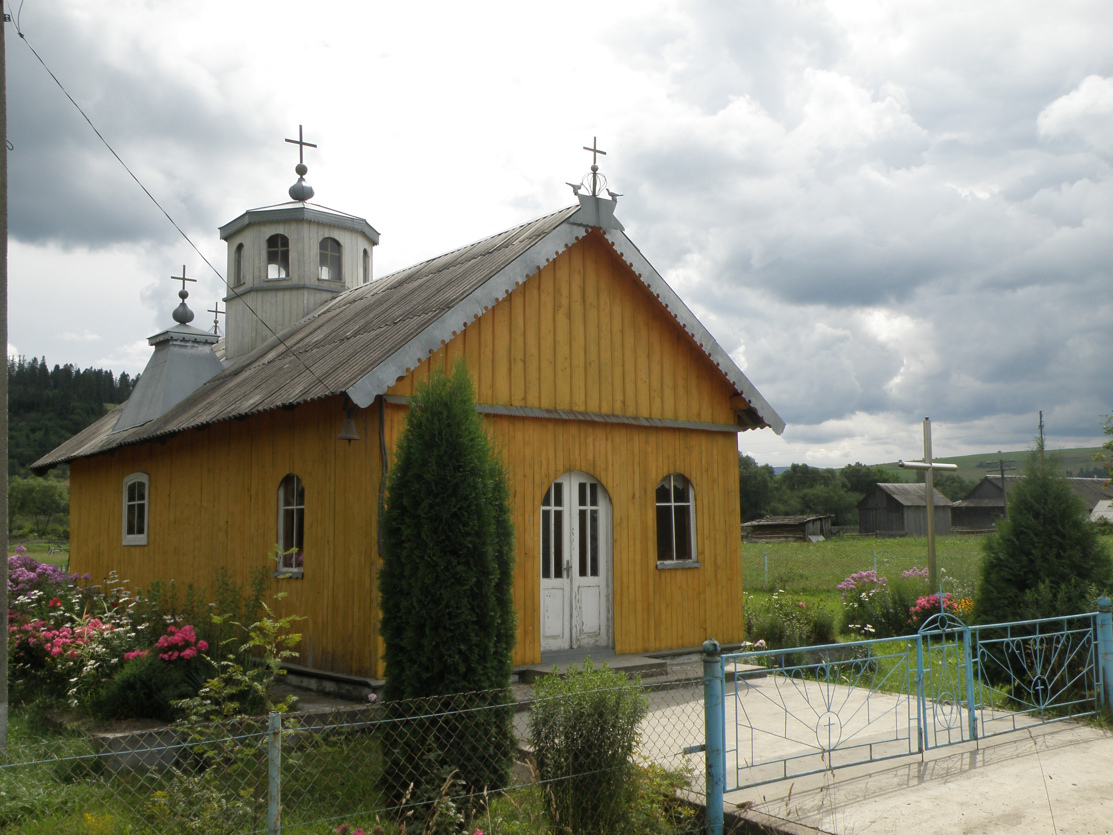 Каплиця Св. Анни (Верхнє Висоцьке) .